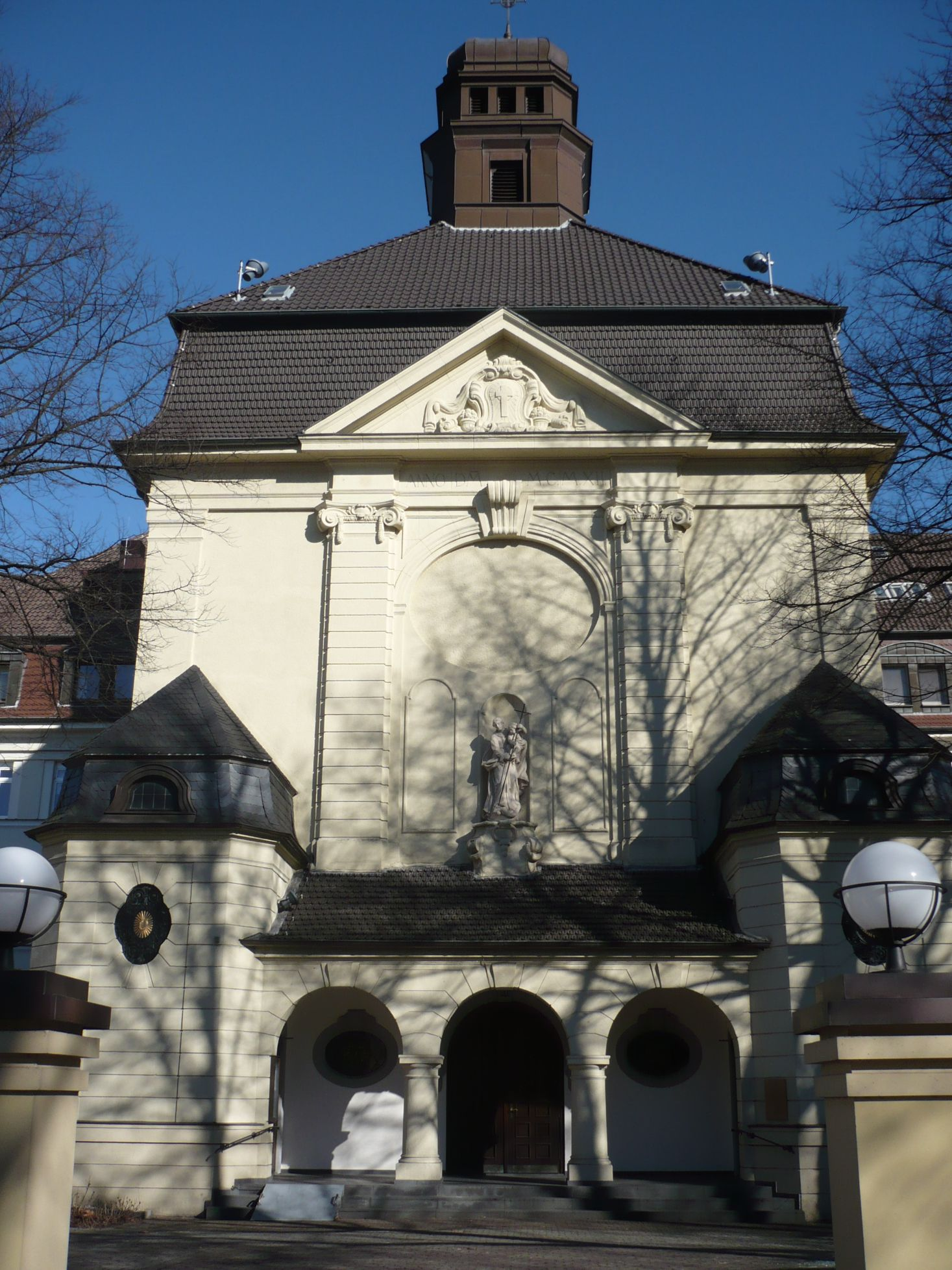 Elisabethkrankenhaus Essen: Kapelle